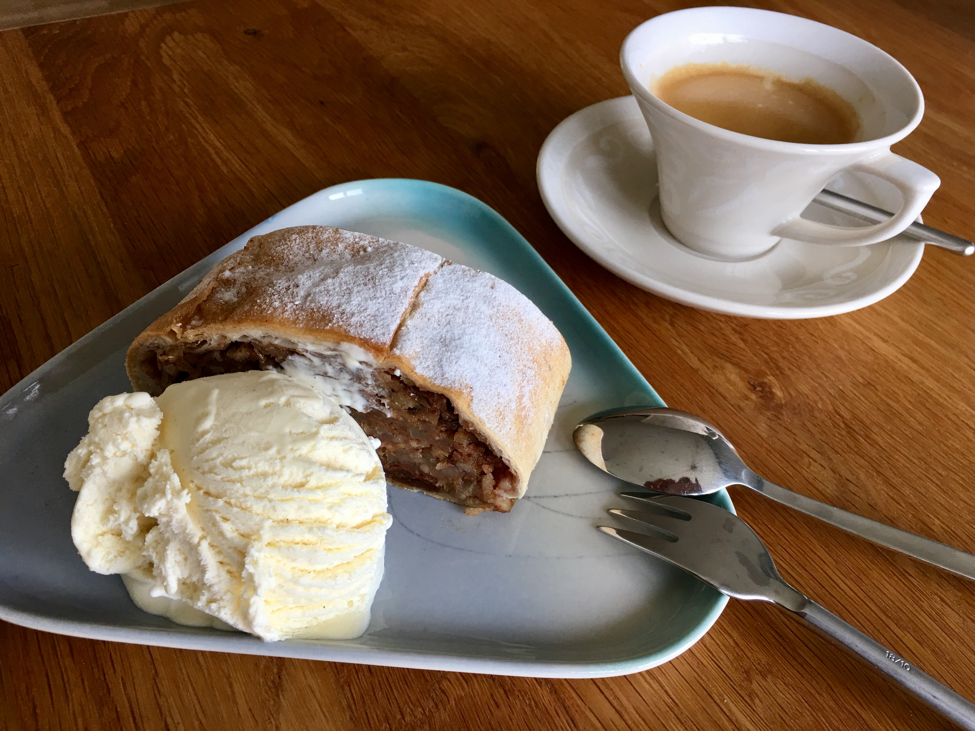 Omenastruudeli vaniljajäätelön kera